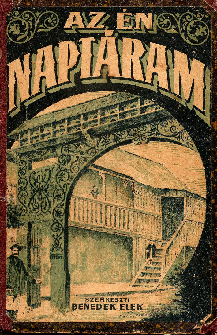 Az én naptáram című lap borítója 1923-1924 körül. Szerkesztő: Benedek Elek.